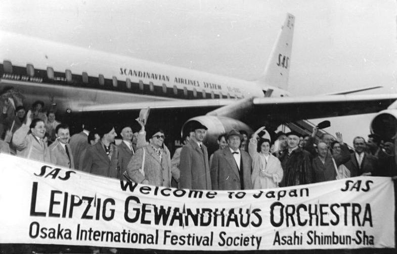 Zentralbild-Terf Me 14.4.61 Gewandhausorchester in Japan Das Leipziger Gewandhausorchester traf am 12.461 mit zwei Sondermaschinen zu seiner vierwöchigen Gastspielreise durch Japan in Tokio ein. Das Orchester hat am 13.4.61 in Osaka anlässlich des Osaka-Festivals, des grössten Musikfestes des Fernen Ostens, sein erstes Konzert gegeben. UBz: Die Mitglieder des Leipziger Gewandhausorchesters nach der Ankuft auf dem Flugplatz in Tokio.